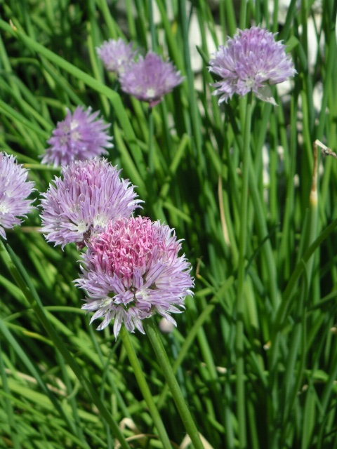 Description: Allium schoenoprasum, juillet 2004, cultivé Source: Jean-Jacques MILAN Licence: GFDL Jean-Jacques MILAN